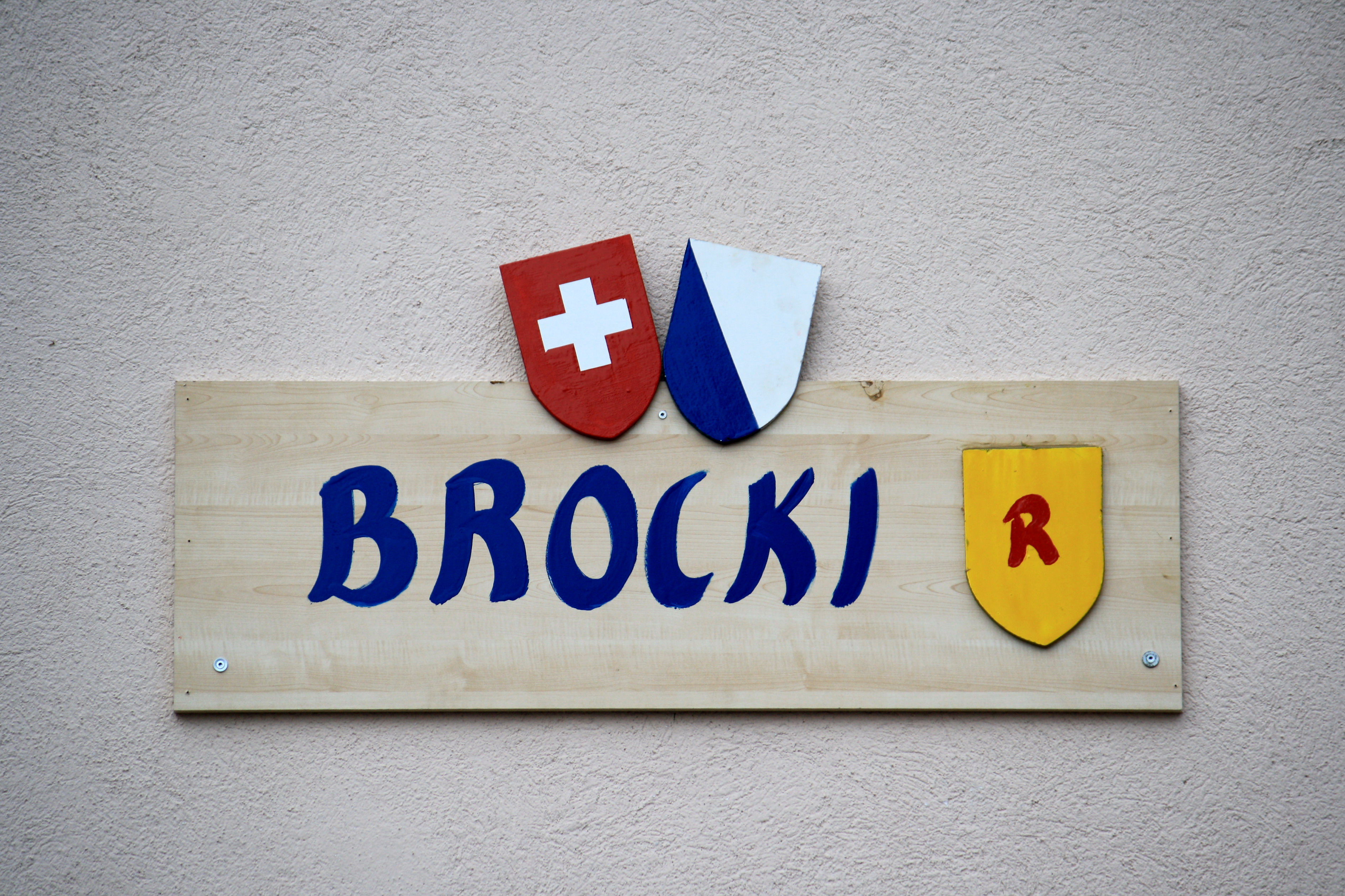 Brocki in Rüti (ZH)